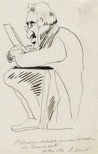 Antoine-Laurent-Thomas Vaudoyer